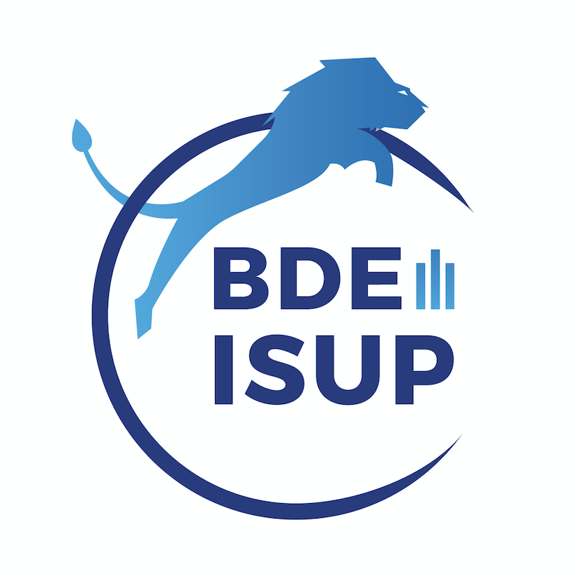 Logo du Bureau des élèves de l'ISUP